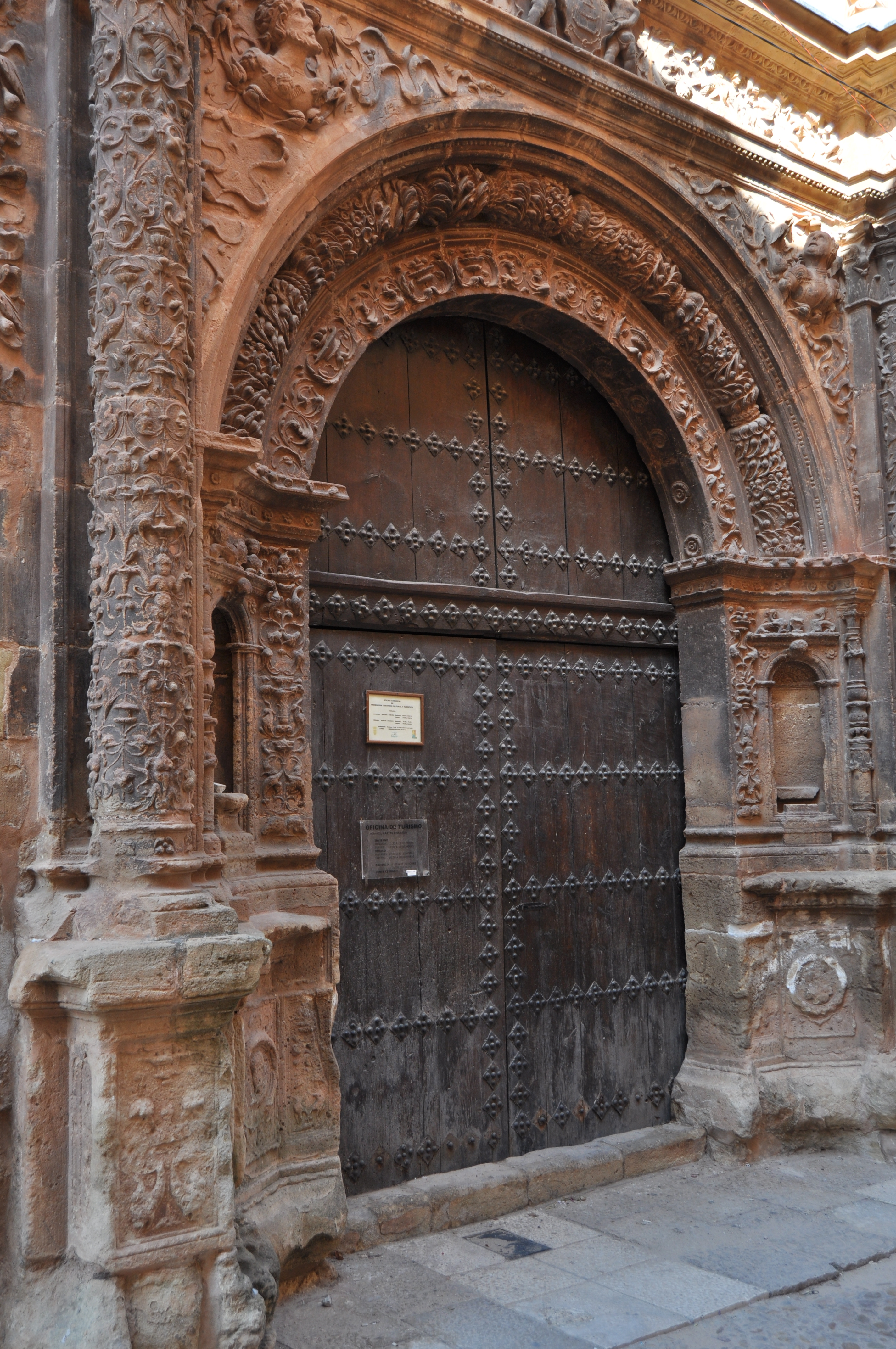 Alcaraz - 026